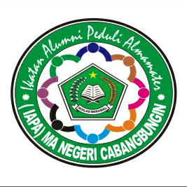 Logo MAN 3 Bekasi